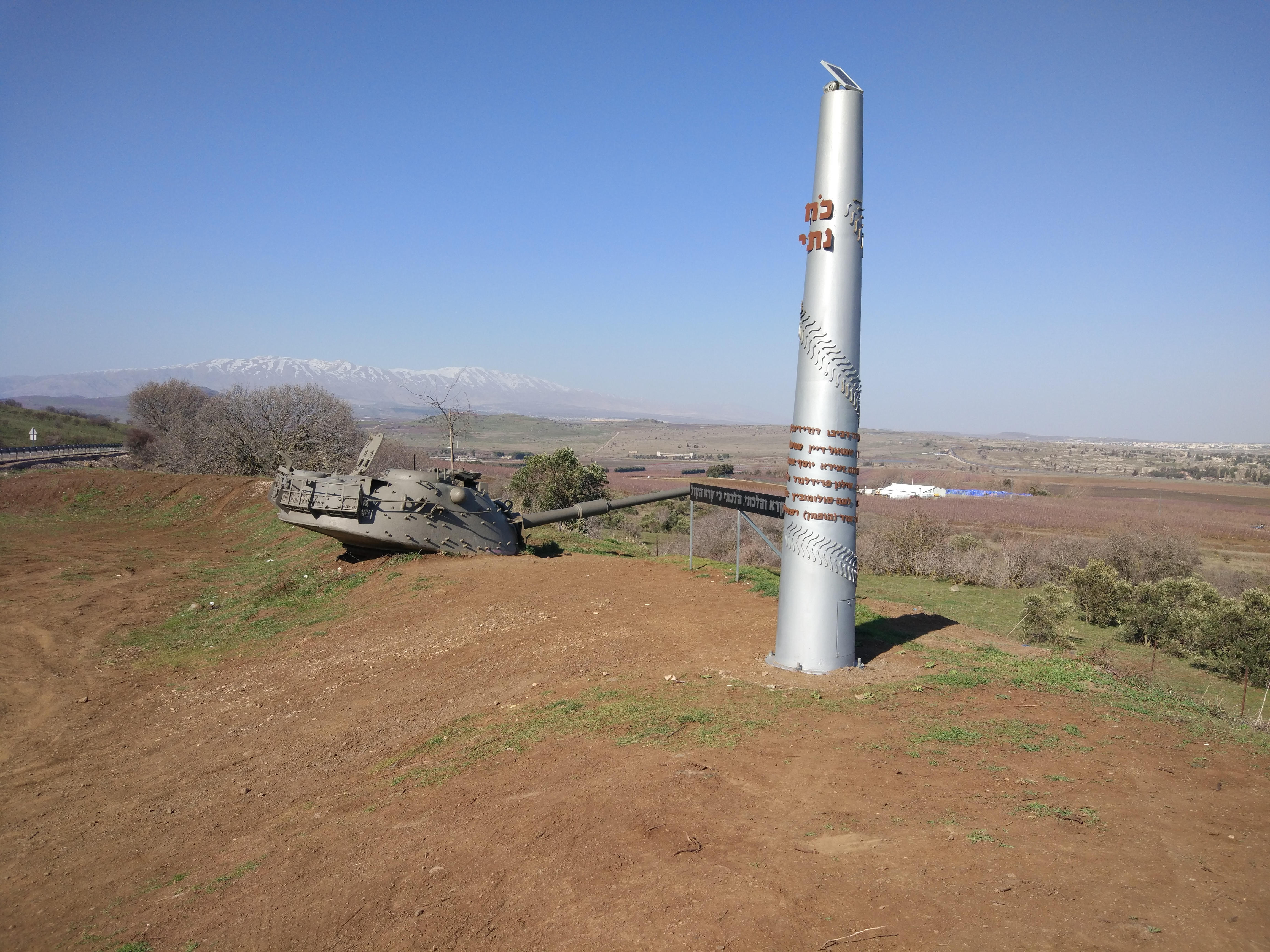 אנדרטת כח נתי ברמפת קוניטרה, כ-100 מטרים צפונית למצפה קוניטרה. האנדרטה צופה לגזרת הלחימה של הכח.